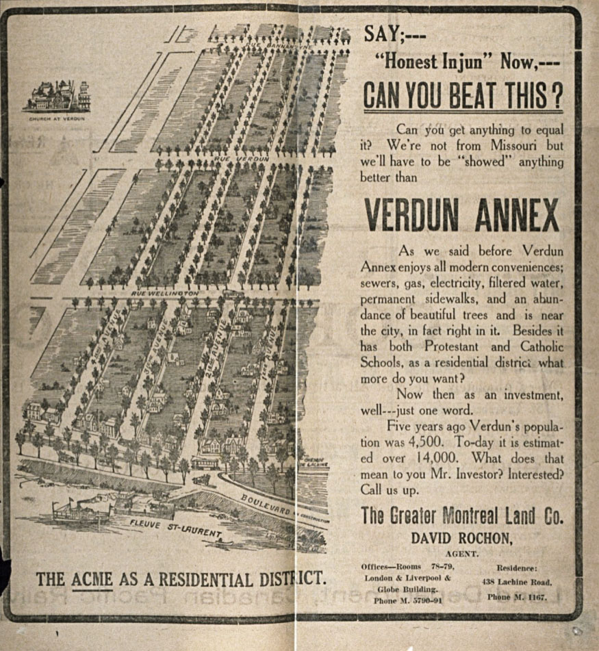 Publicité de la Greater Montreal Land Co. pour le déveleppement des avenues de Verdun